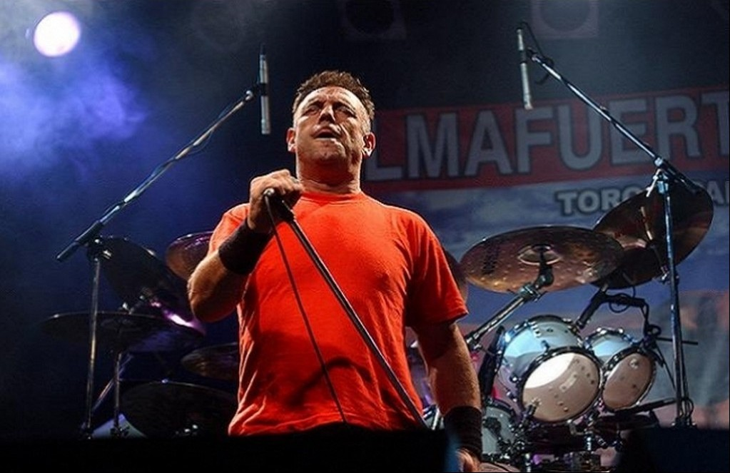 "El hombre tiene que tener miedo, cuando se da cuenta que puede hacer el mal" Ricardo Iorio